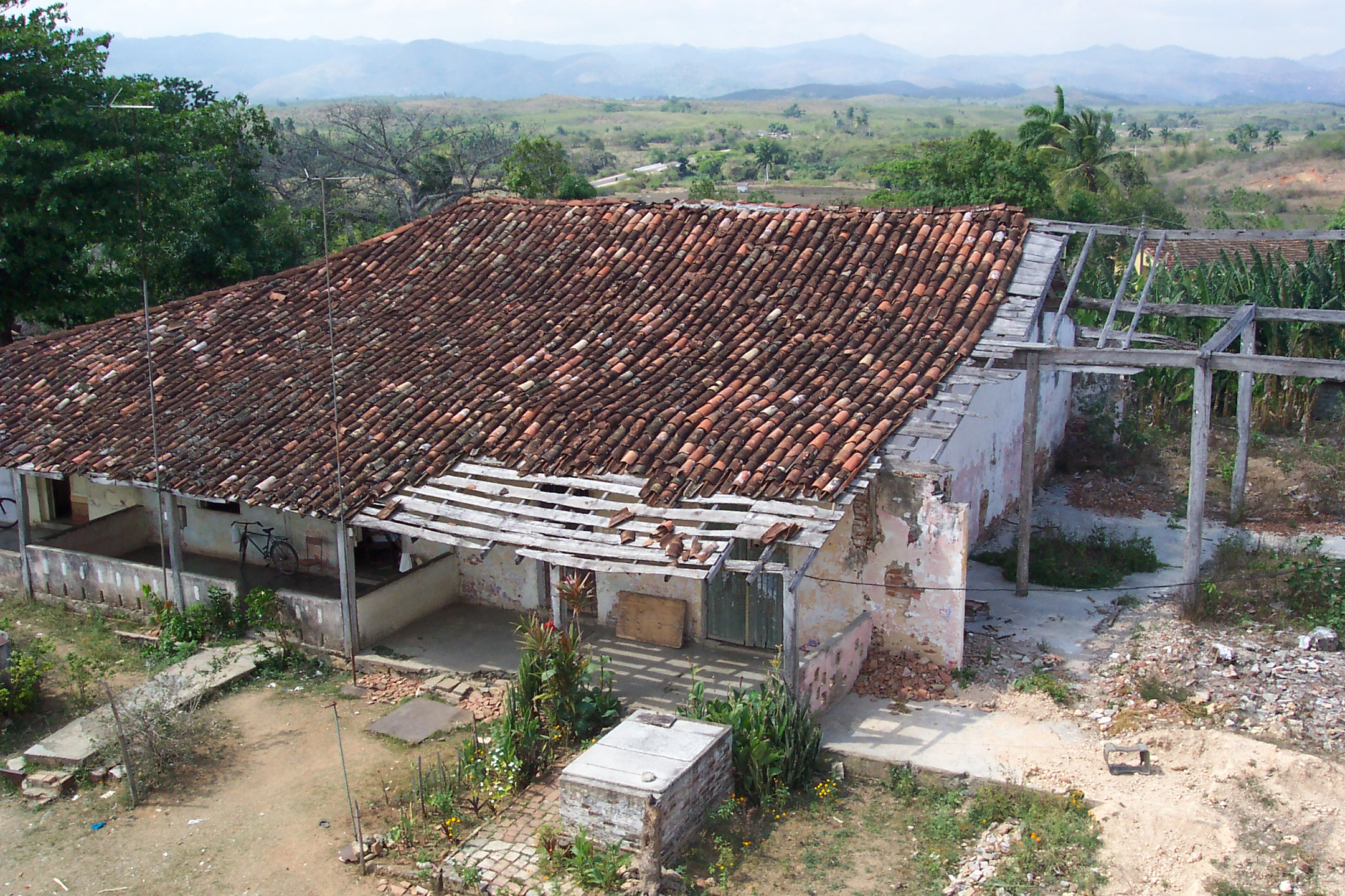 Barracones (slave dwellings) at Manaca Iznaga, Valle de los Ingenios, Cuba